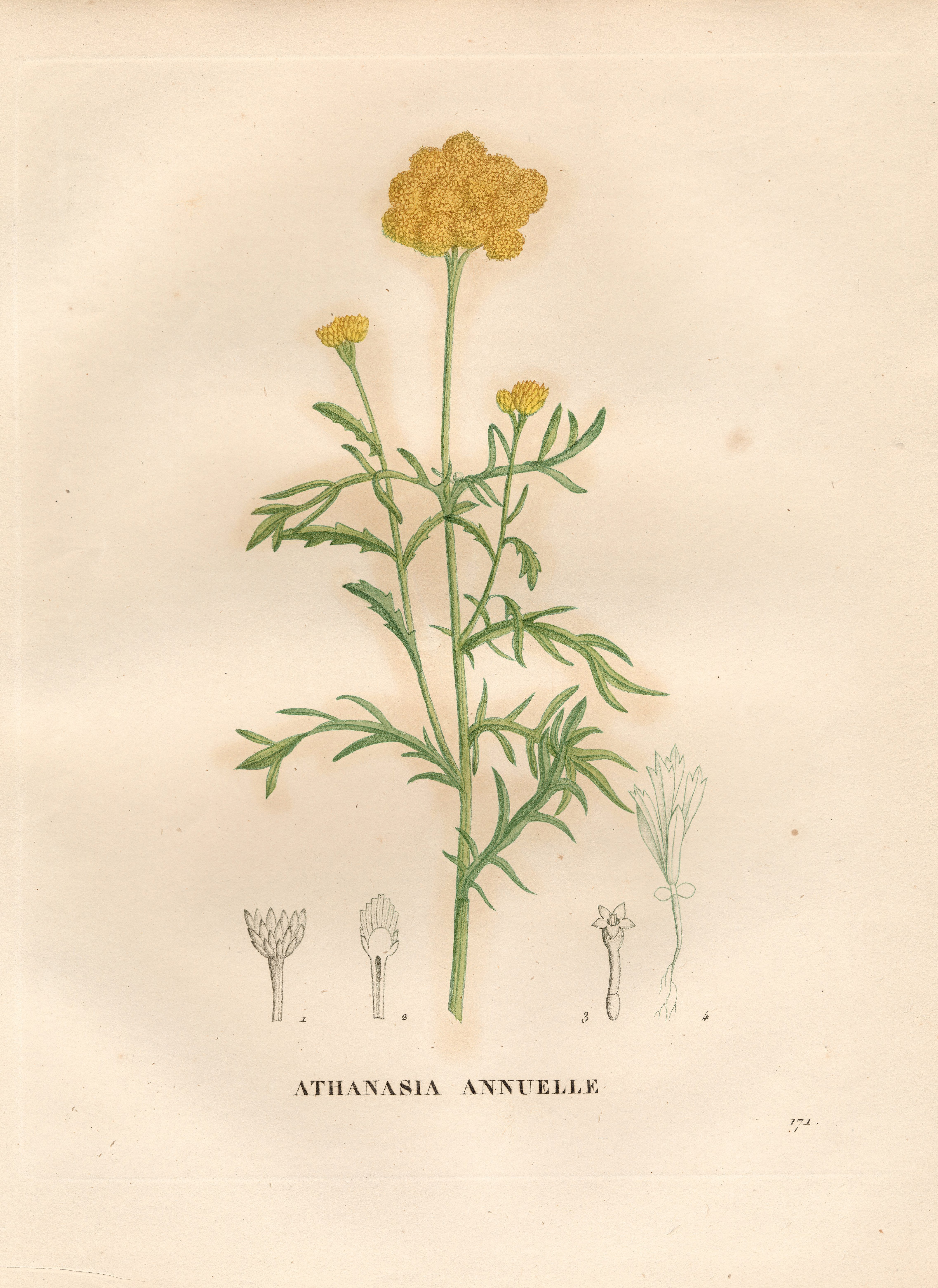 Legende: 1 Hülle. 2 Körbchenboden und Spreublätter, Längsschnitt, Blüten entfernt. 3 Röhrenblüte (vergr.). 4 Keimpflanze.